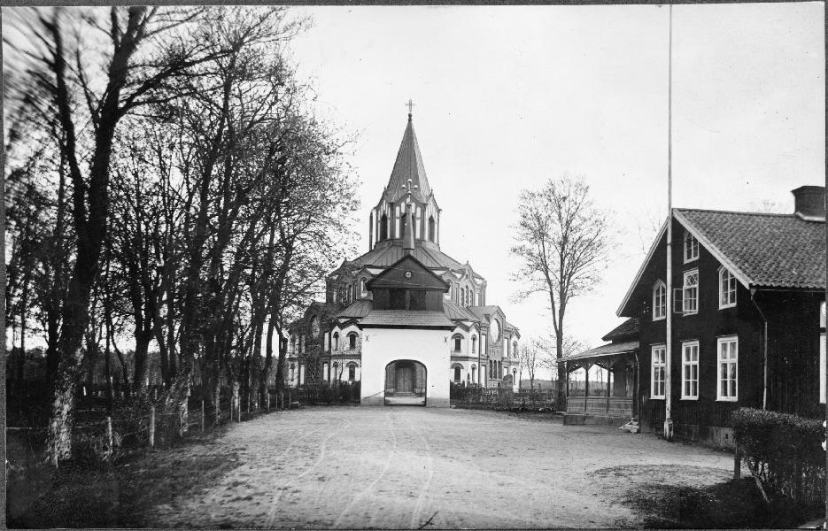 Kyrkan och klocktornet från norr. Kategori: (01) ExteriörerKyrkan och klocktornet från norr.